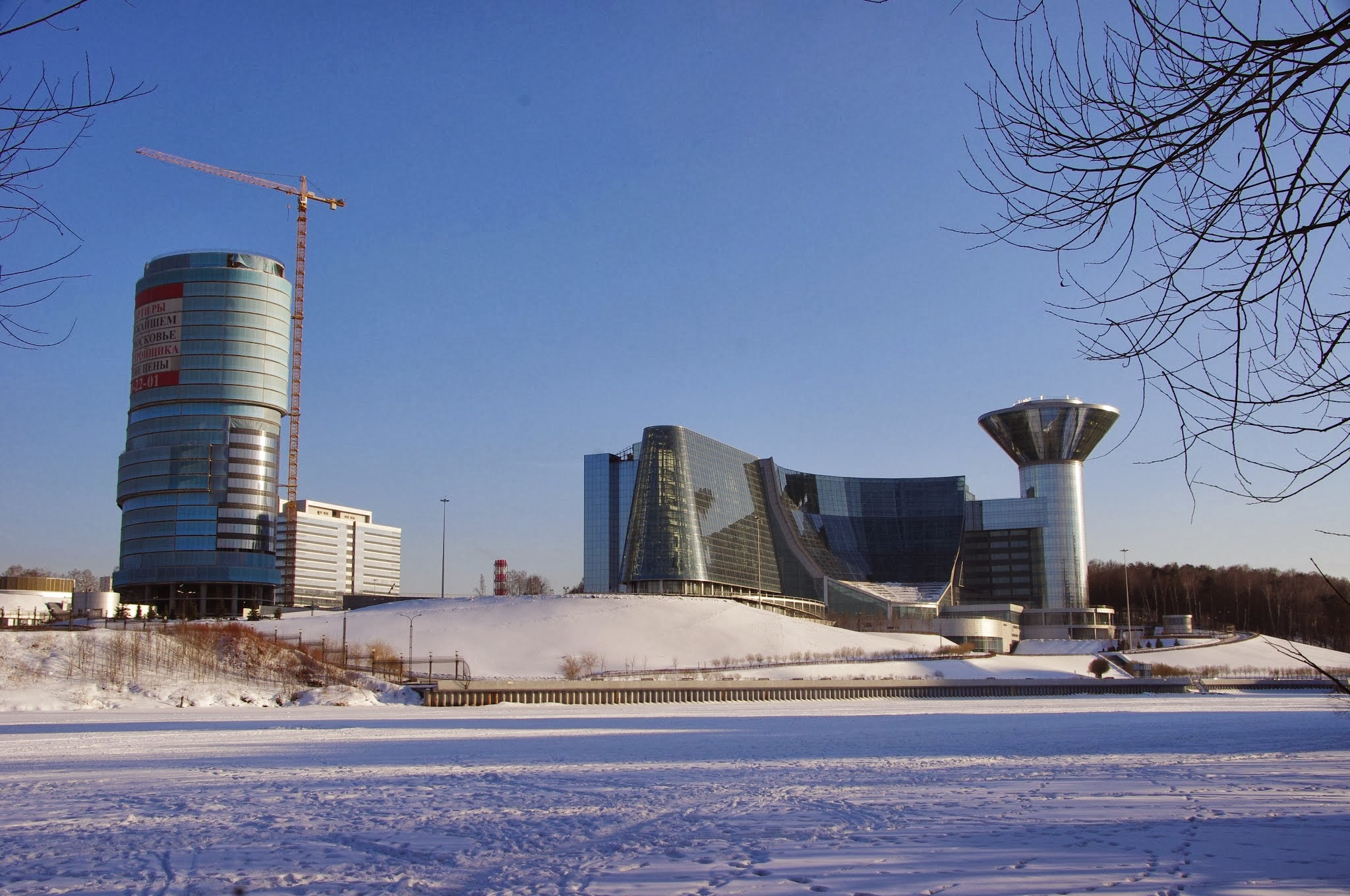 Krasnogorsk, Moscow Oblast, Russia